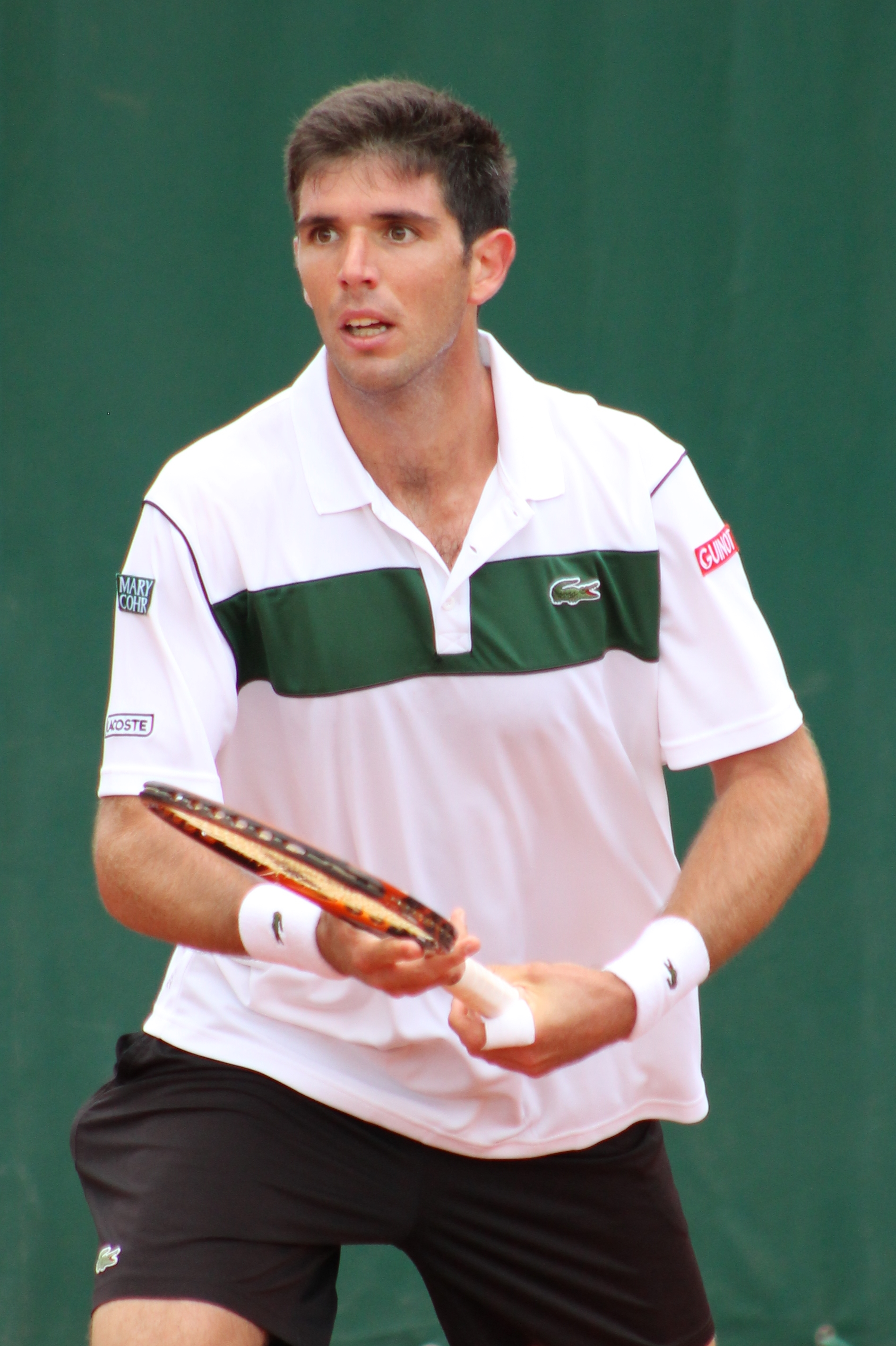 Delbonis RG15 (7)